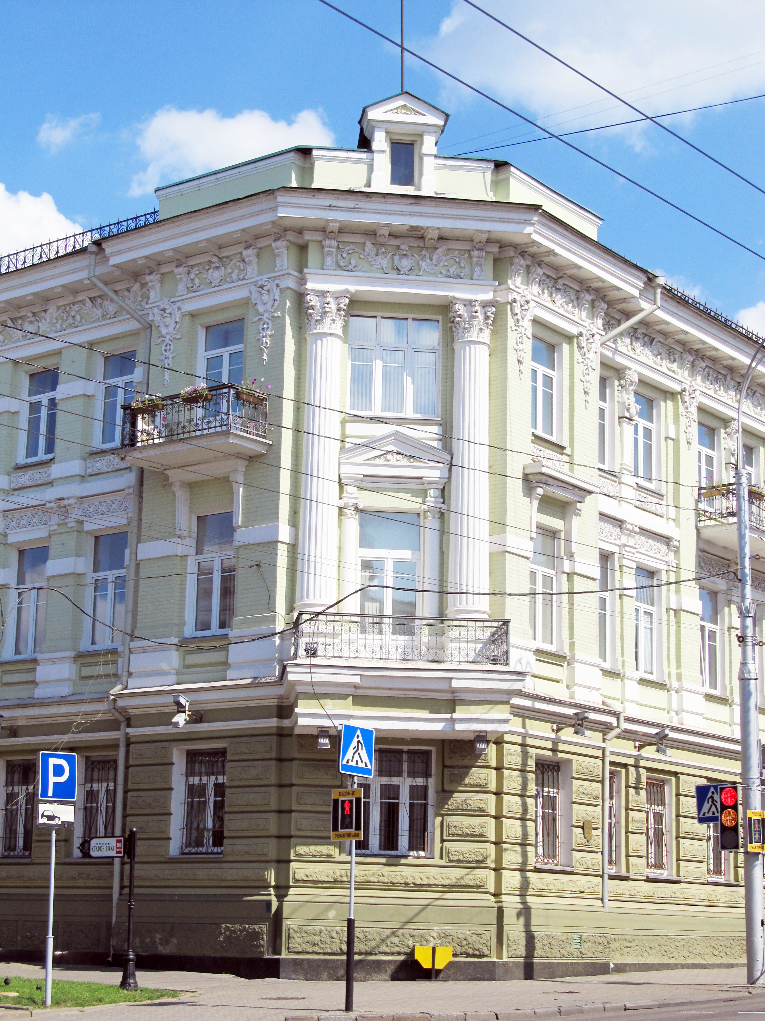 Беларуская (тарашкевіца): Забудова вул. Савецкай. г. Гомель This is a photo of Belarusian heritage monument. Reference number: 313Г000073 ( WLM)